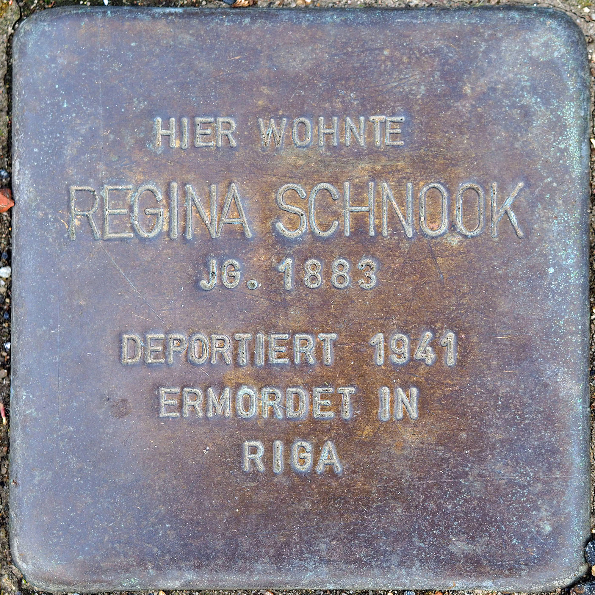 Stolpersteine Korschenbroich: Schnook, Regina